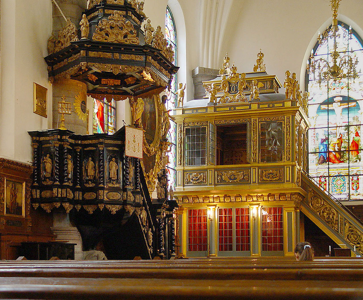 Kanzel und Königsloge der deutschen Kirche in Stockholm (Tyska Kyrkan)